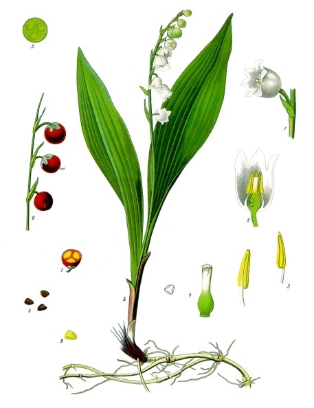 Maiglöckchen. A Blühende Pflanze. 1 Einzelne Blüte; 2 dieselbe im Längsschnitt; 3 Staubblätter von der Bauch- und Rückenseite; 4 Pistill mit Narbe von oben gesehen; 5 Pistill im Querschnitt; 6 Fruchtzweig; 7 Frucht im Querschnitt; 8 Samen; 9 dieselbe im Längsschnitt. A 6, 7 natürliche Grösse. 1—5, 8, 9 vergrössert.